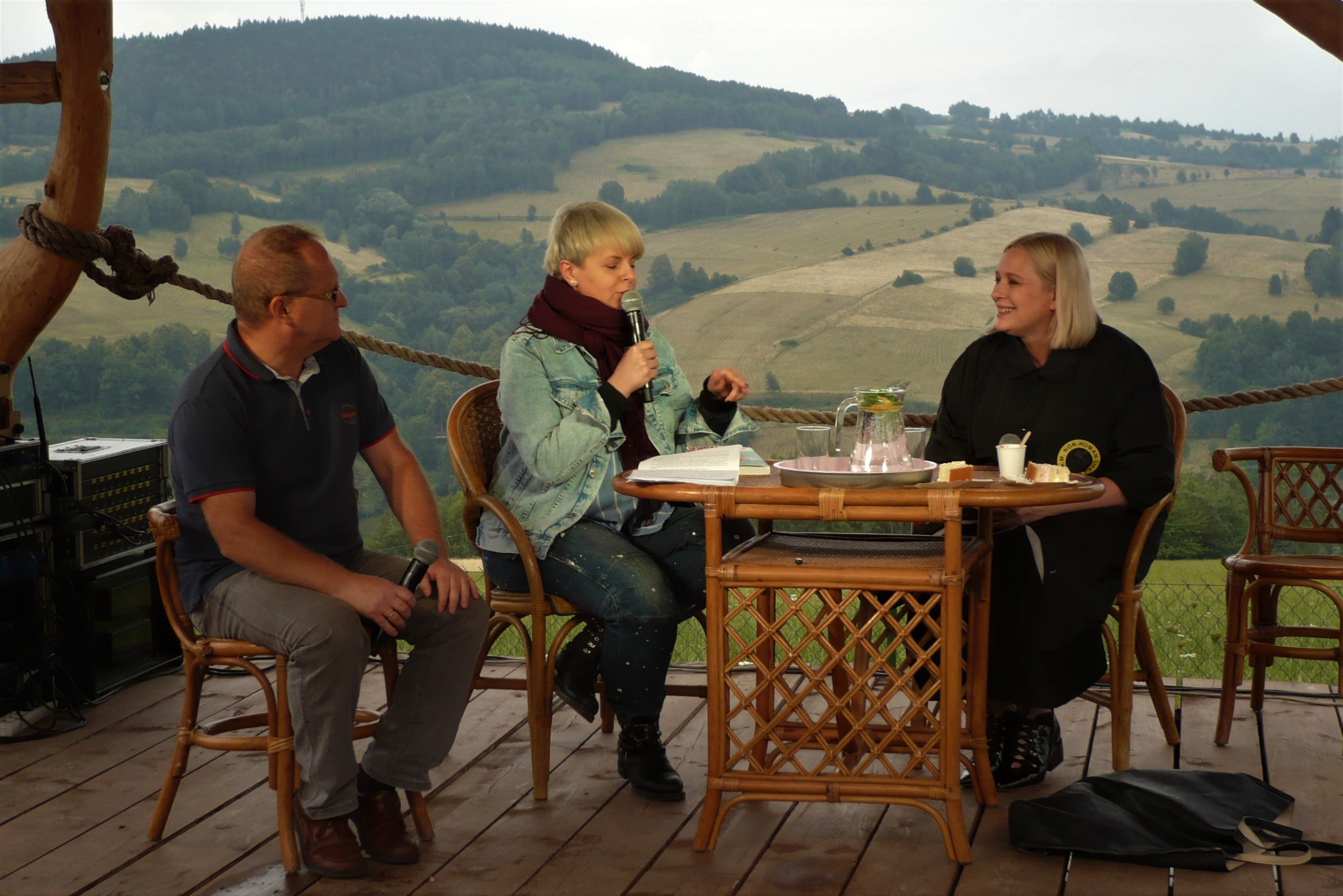 Karol Maliszewski, Karolina Korwin Piotrowska i Katarzyna Nosowska podczas Festiwalu Góry Literatury, 2018